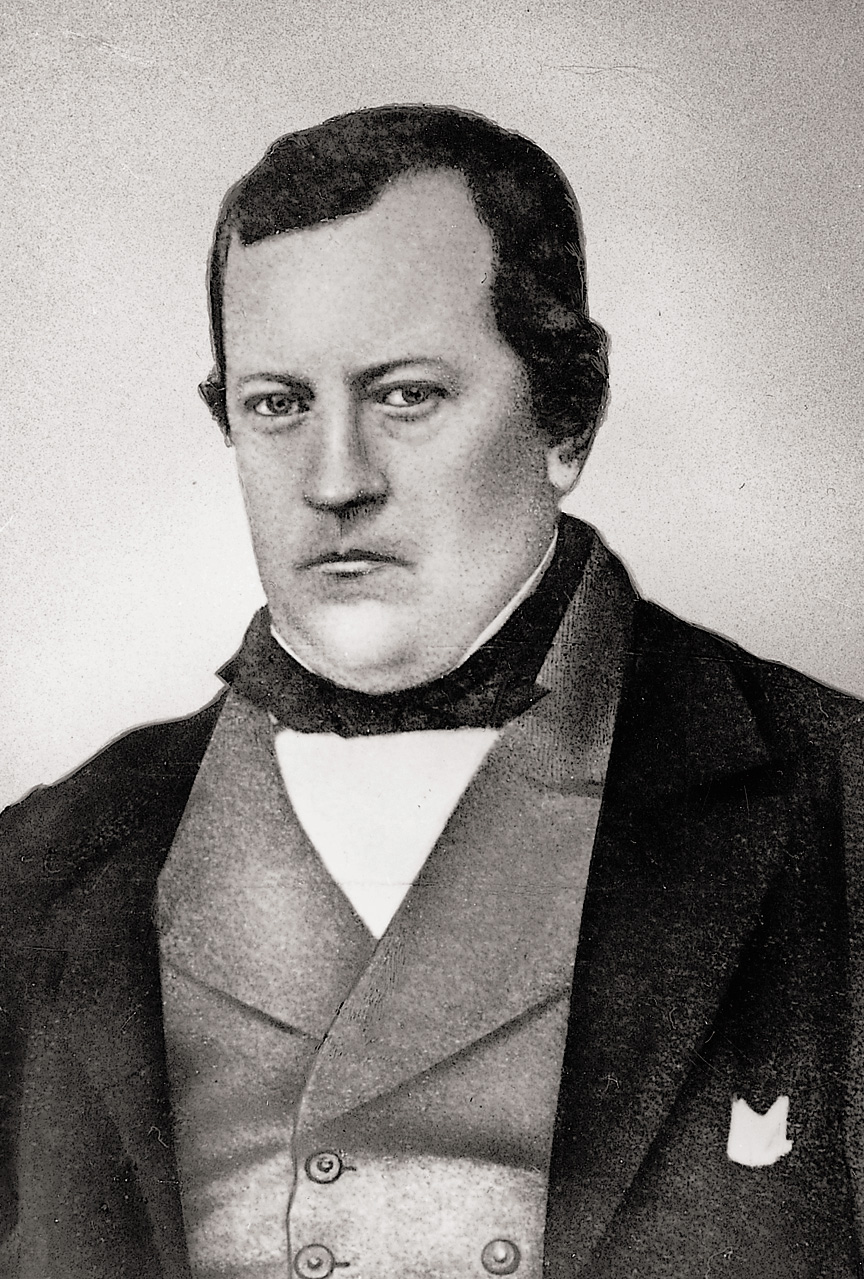 Andreas Hamm (1824-1894), Glockengießer und Fabrikant in Frankenthal (Pfalz)